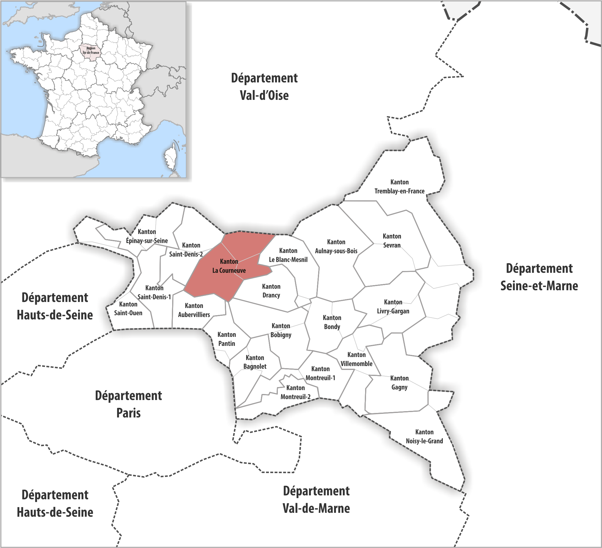 Lage des Kantons La Courneuve